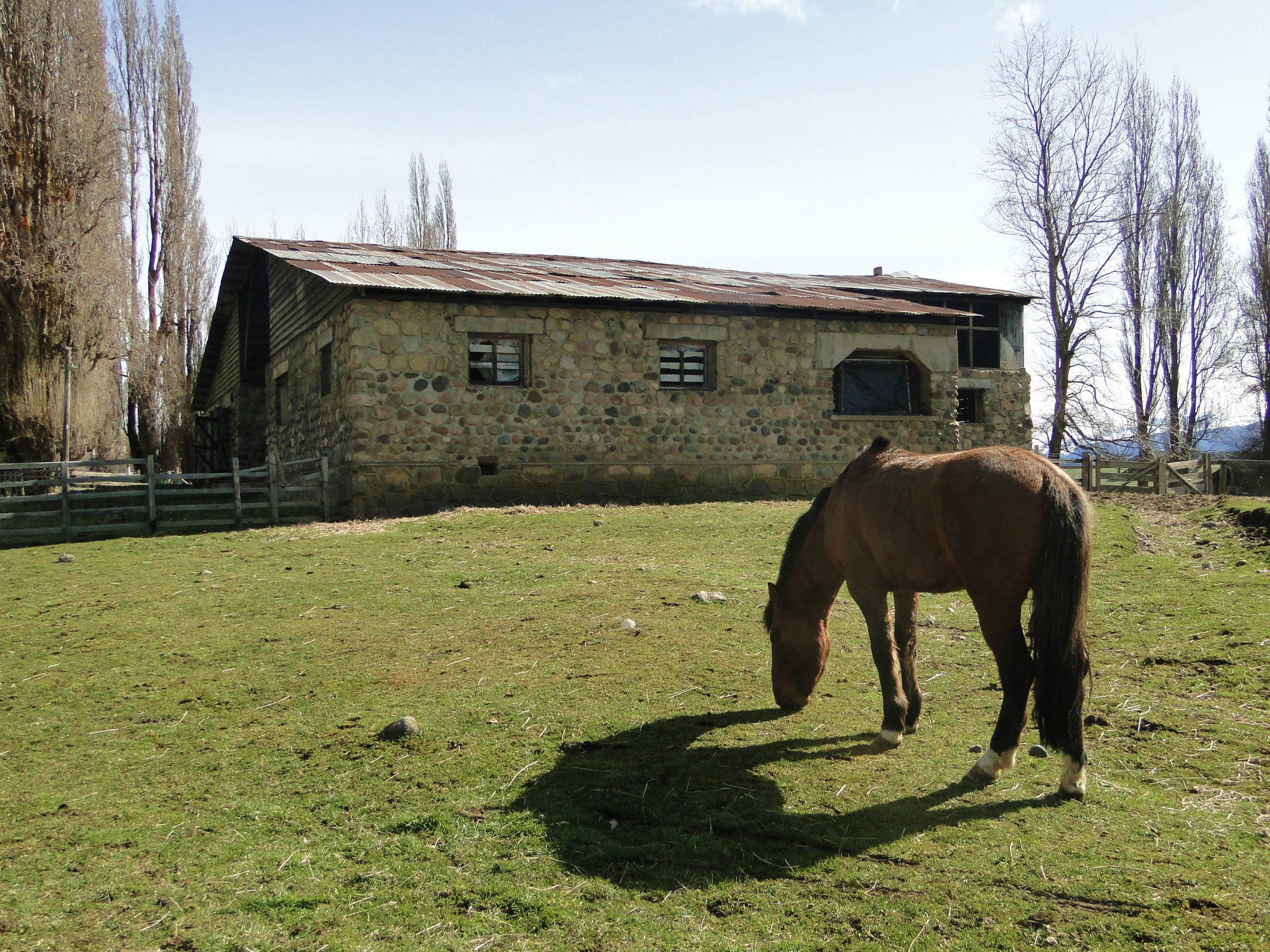 Construcciones de la Sociedad Industrial de Aysén This is a photo of a national monument in Chile: 2134